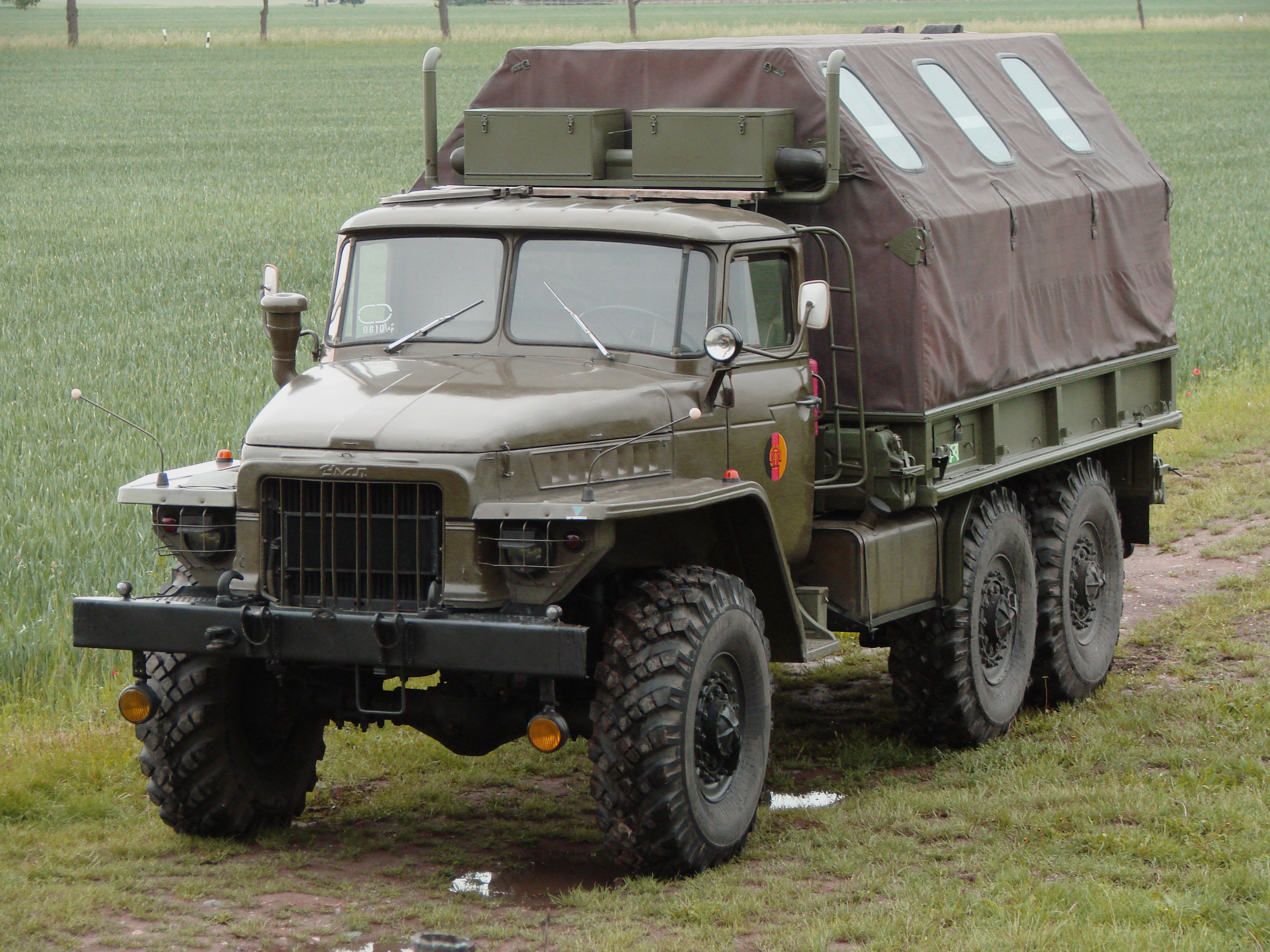 Ural-375D der NVA - hier als Werkstattfahrzeug